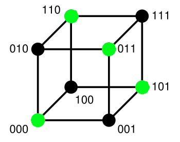 Illustration de l'utilisation d'un bit de parité pour un message binaire à deux lettres